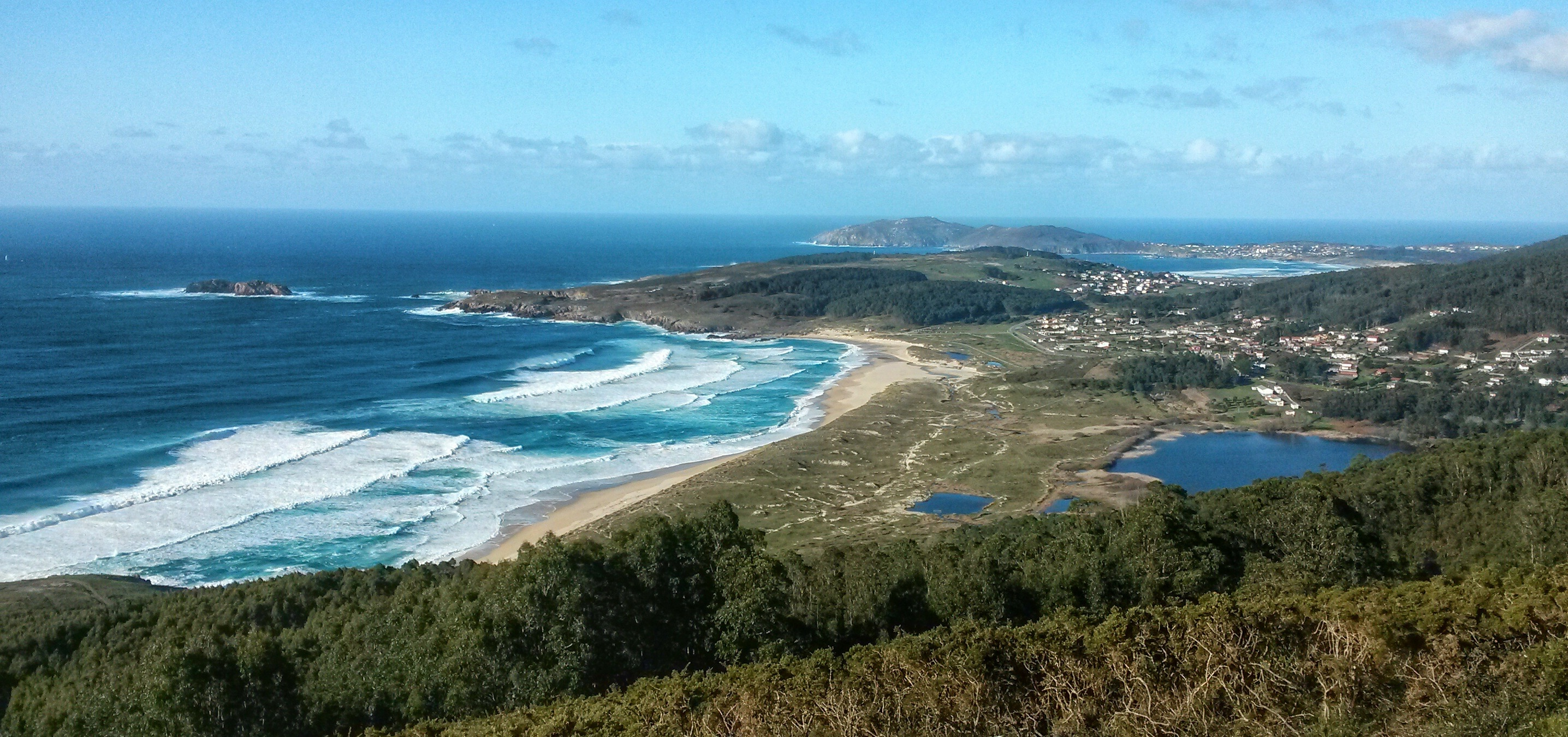 Playa de Doniños desde Monteventoso